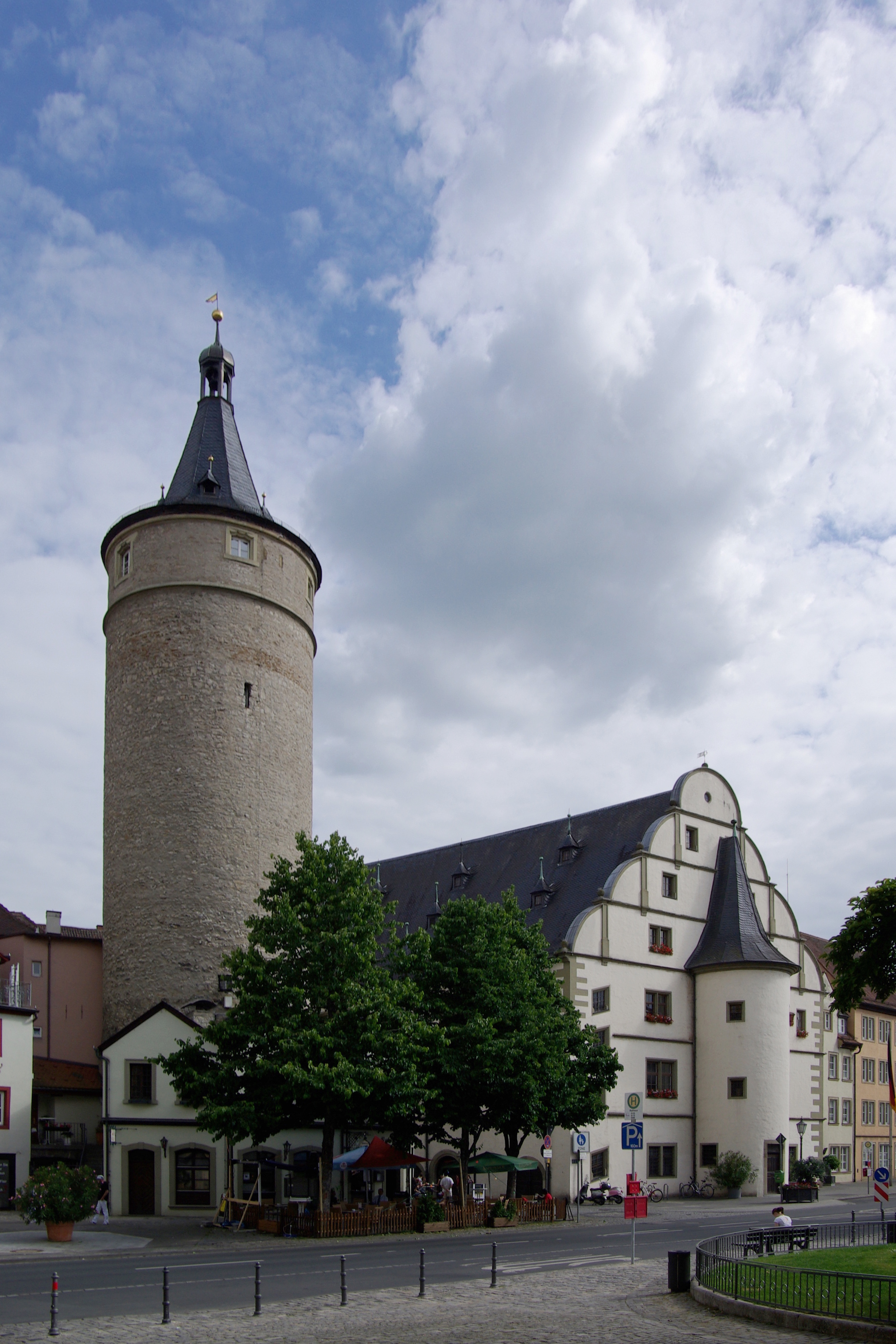 Kitzingen, Rathaus, aus dem Jahr 1563